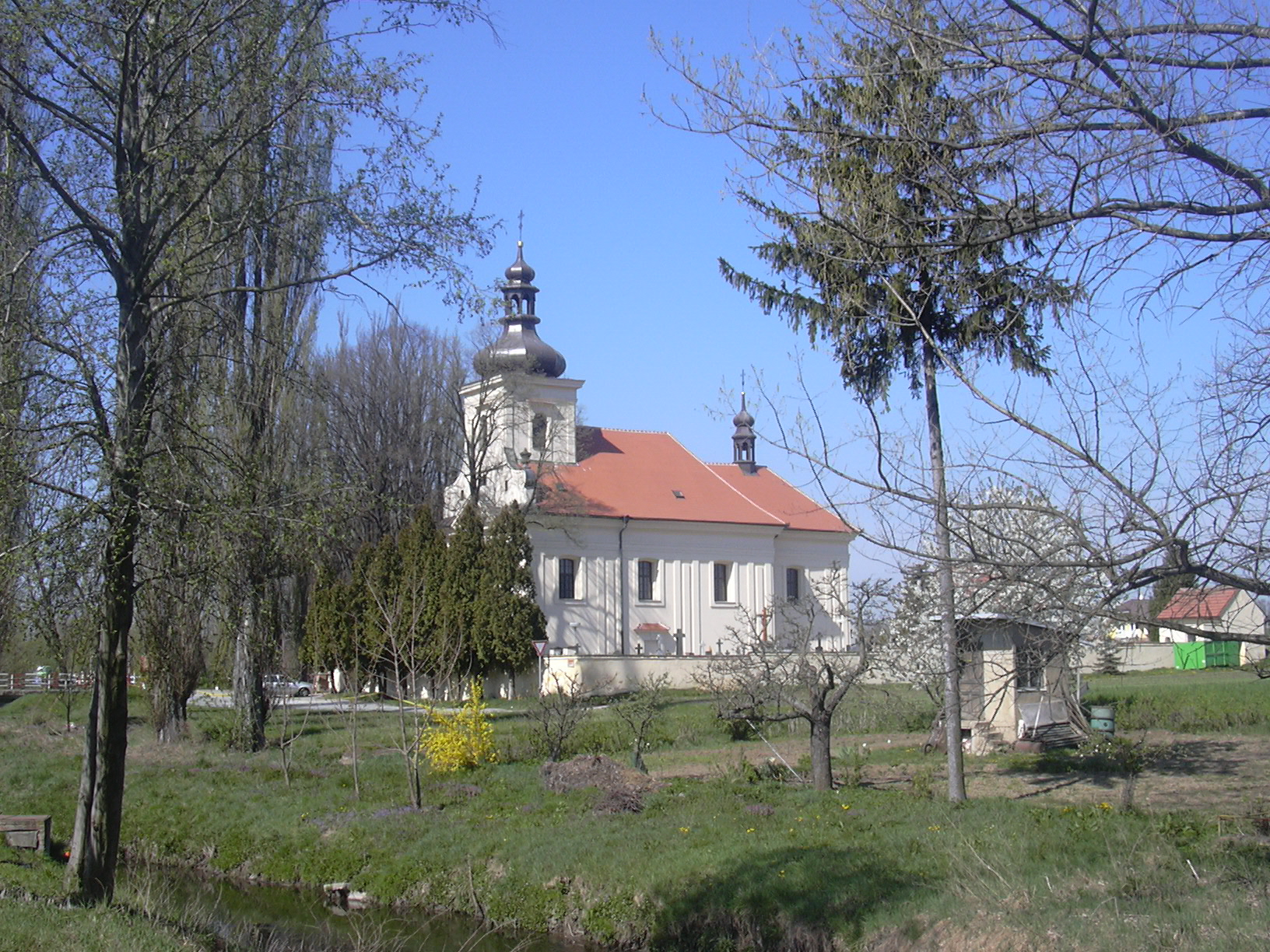 Topolany - Kostel svatého Mikuláše / St. Nicholas Church (Vyškov District, Czech Republic)